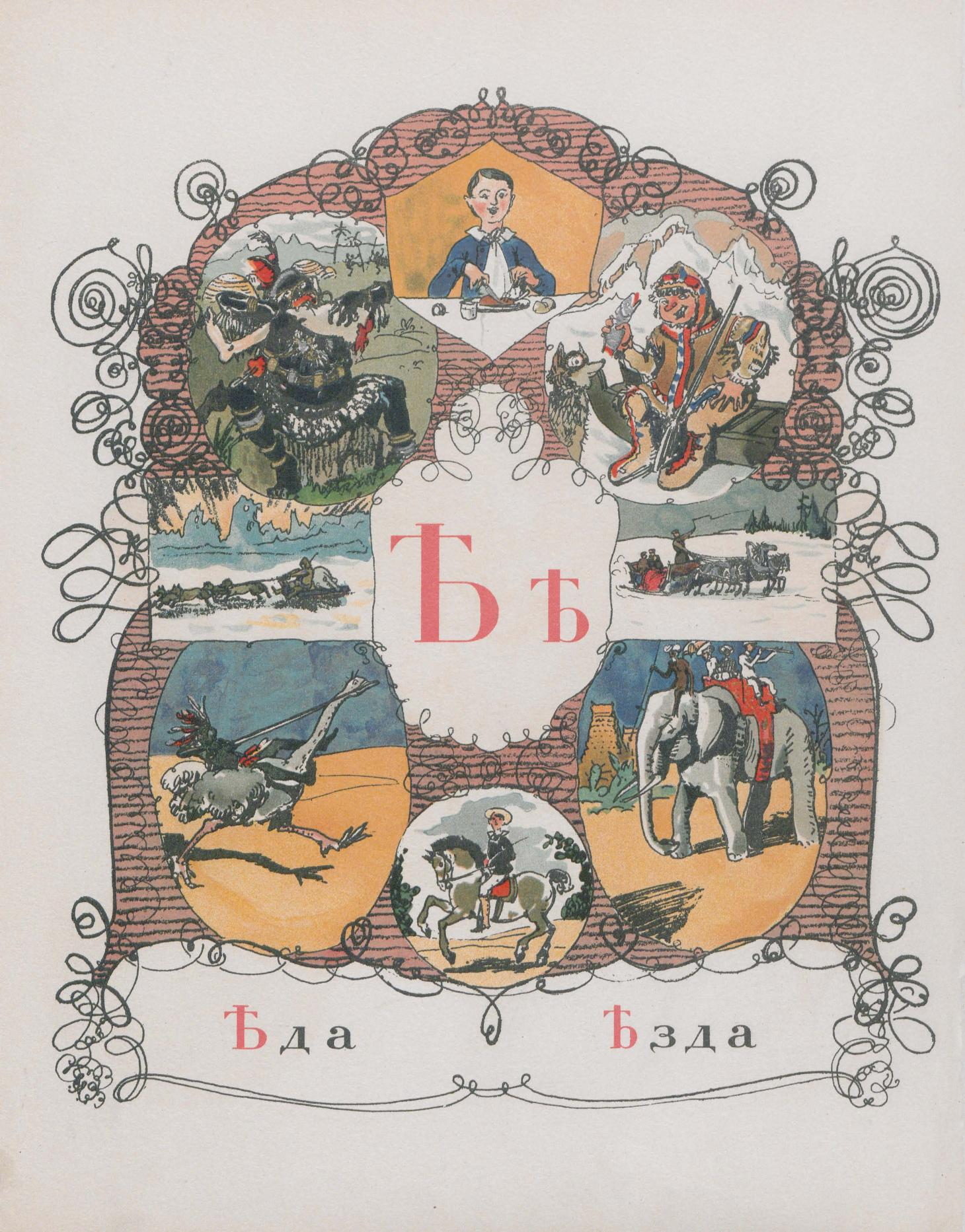 Страница с буквой Ѣ из книги «Азбуки в картинках» - Александр Николаевич Бенуа 1904г.